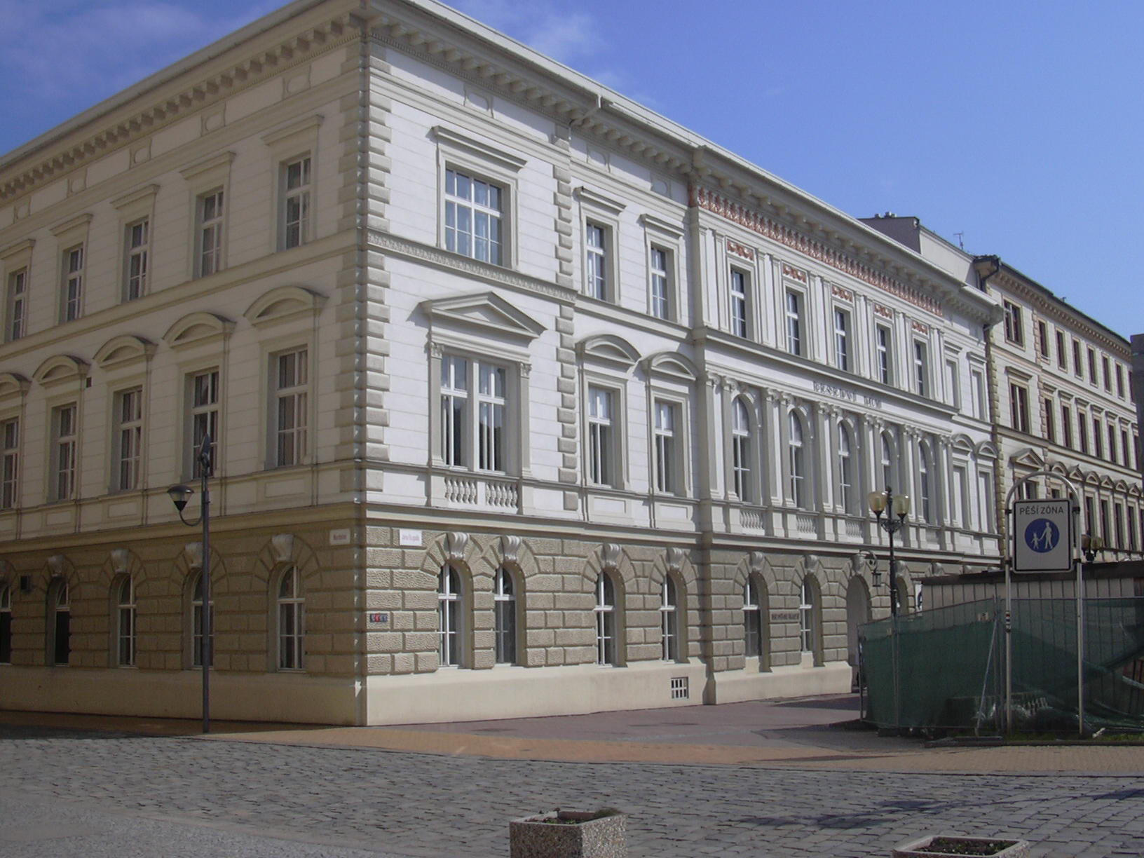 Besední dům (Vyškov- czech republic)